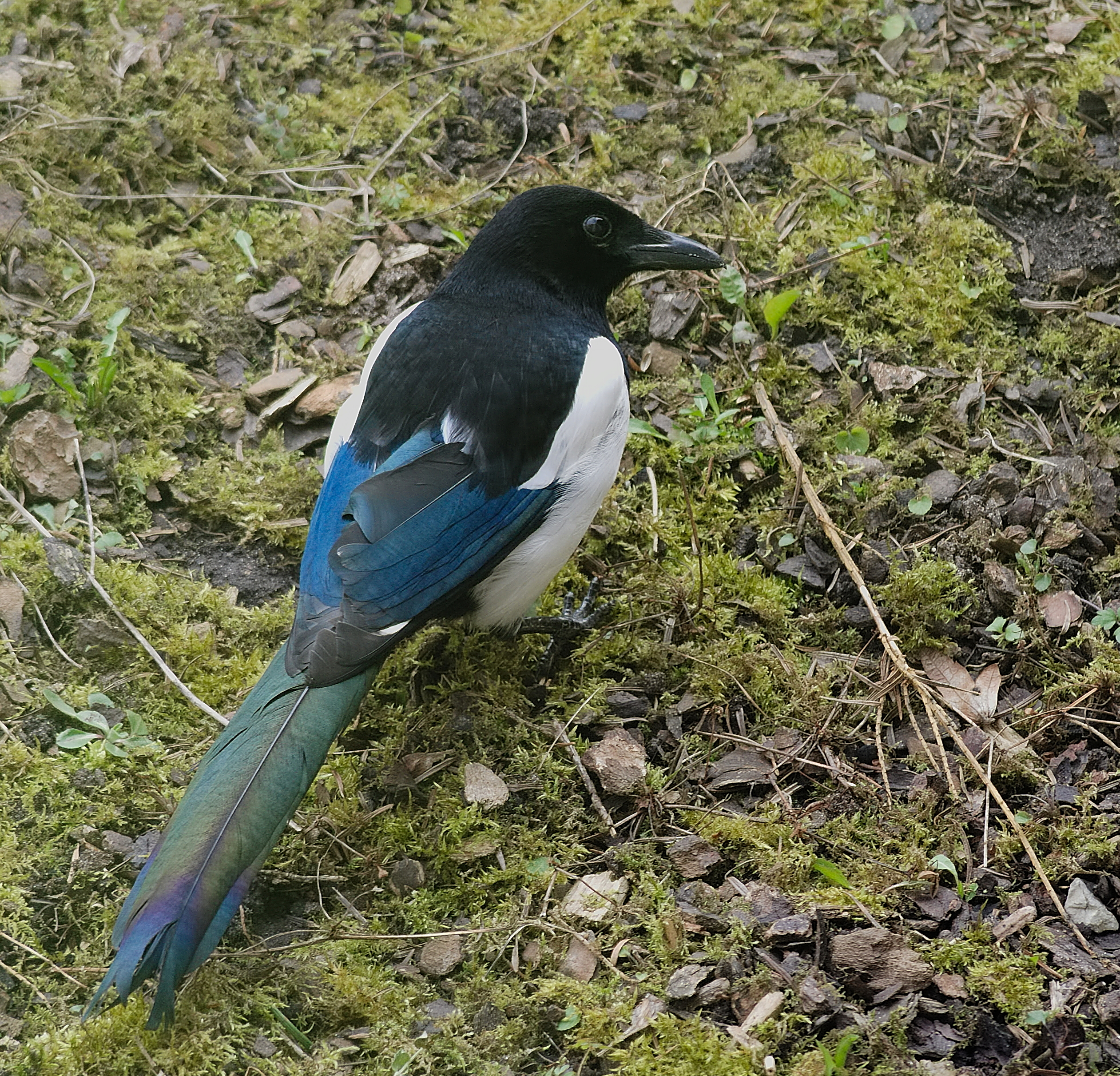 Elster - Pica pica. Aufgenommen in Mannheim-Vogelstang, Baden-Württemberg, Deutschland.